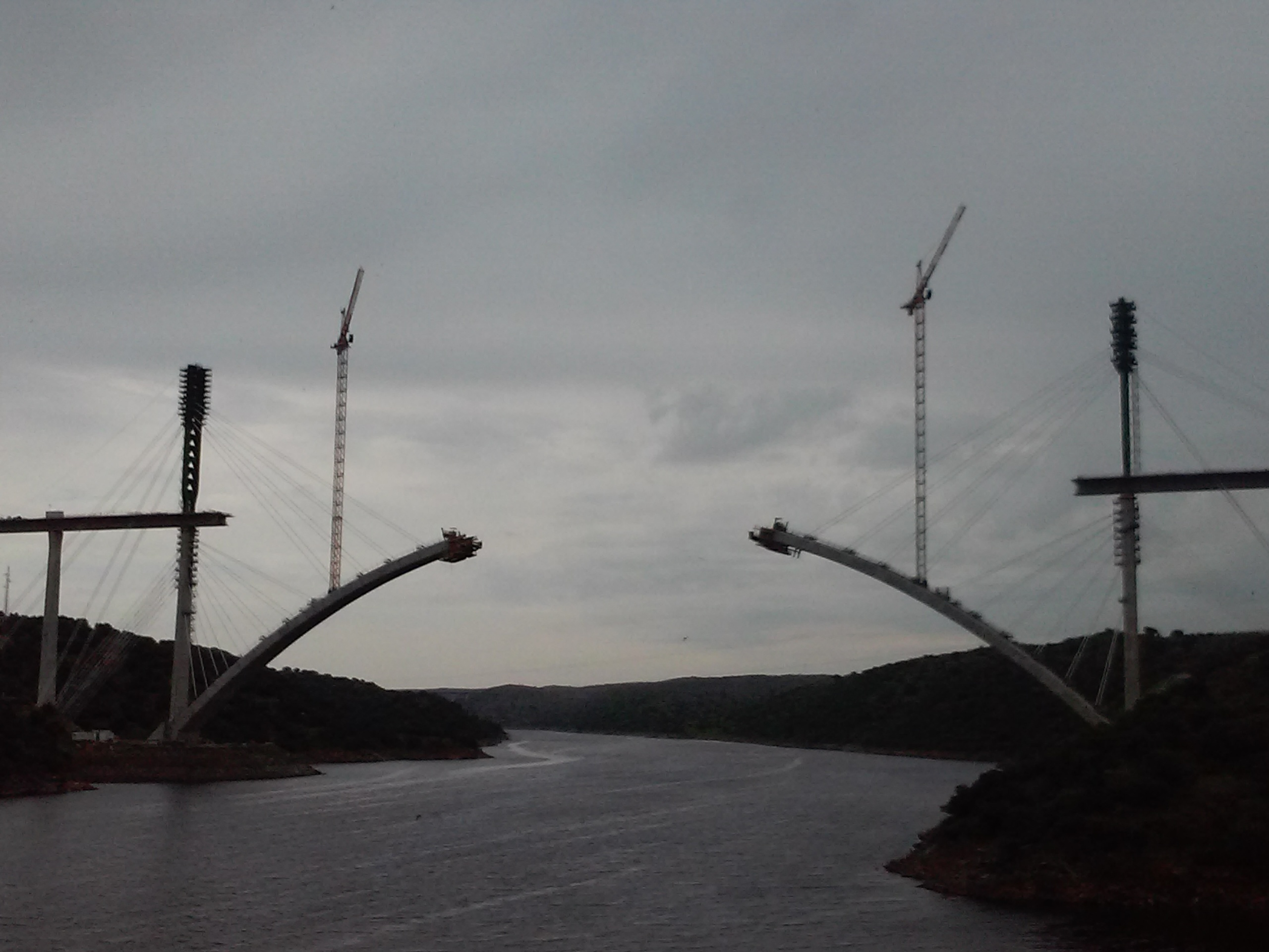 Viaducto en construcción para el tren de alta velocidad sobre el embalse de Alcántara, en Extremadura.